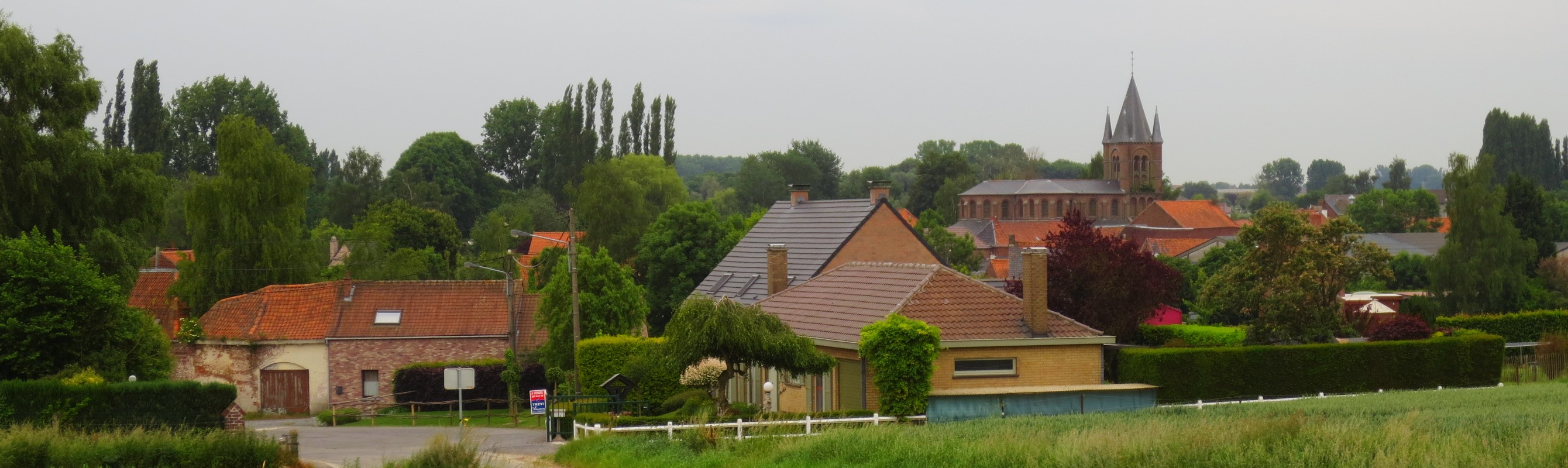 Willemeau